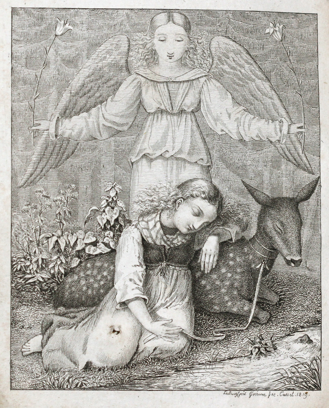 Erster Band der zweiten Ausgabe der Kinder- und Hausmärchen, 1819; Frontispiz: Illustration zu Brüderchen und Schwesterchen